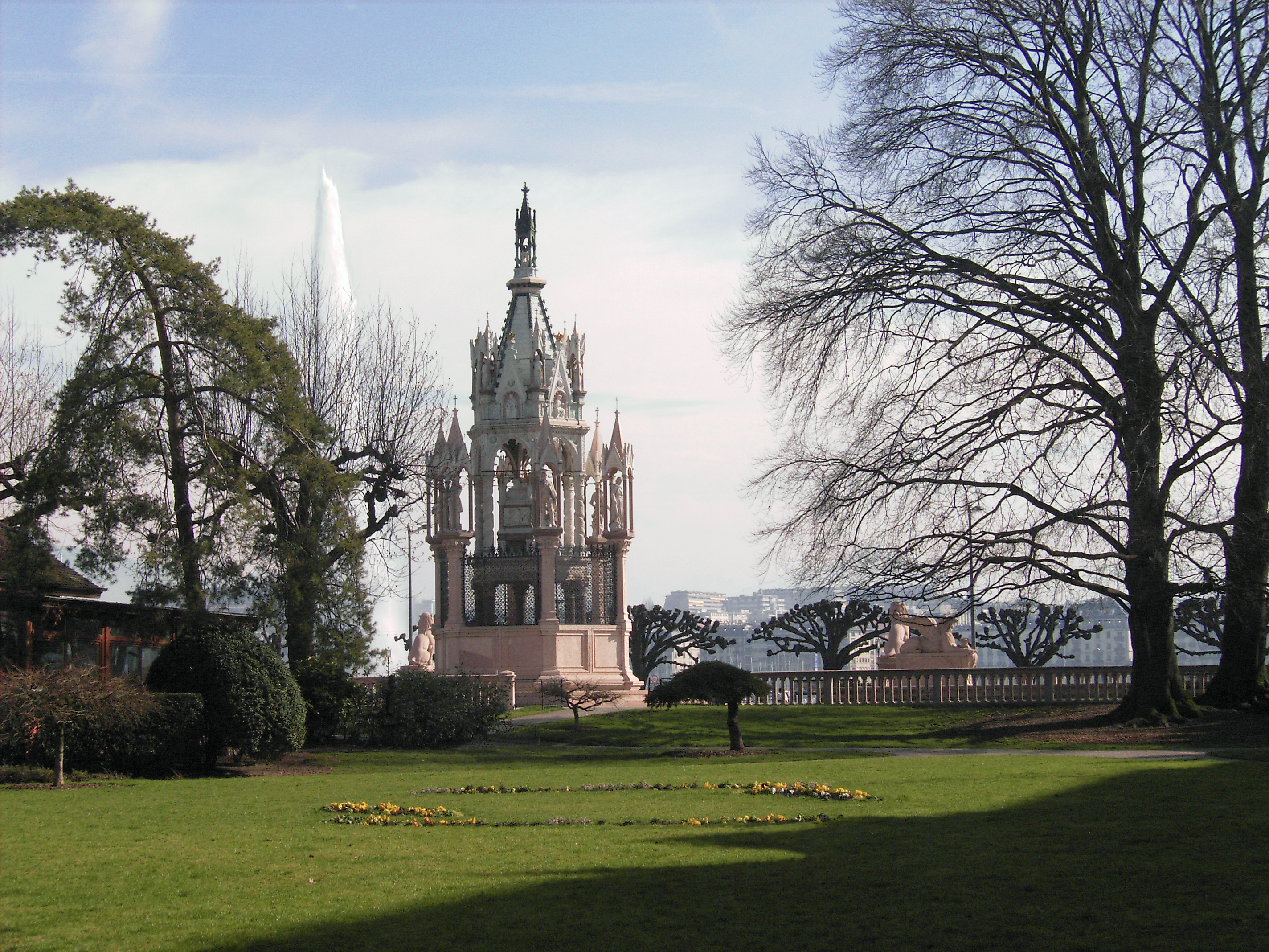 Brunswick Monument in Geneva; Braunschweig Monument in Genf